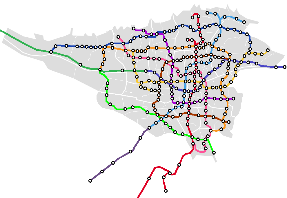 نقشه جغرافیایی مترو تهران و مناطق شهرداری تهران